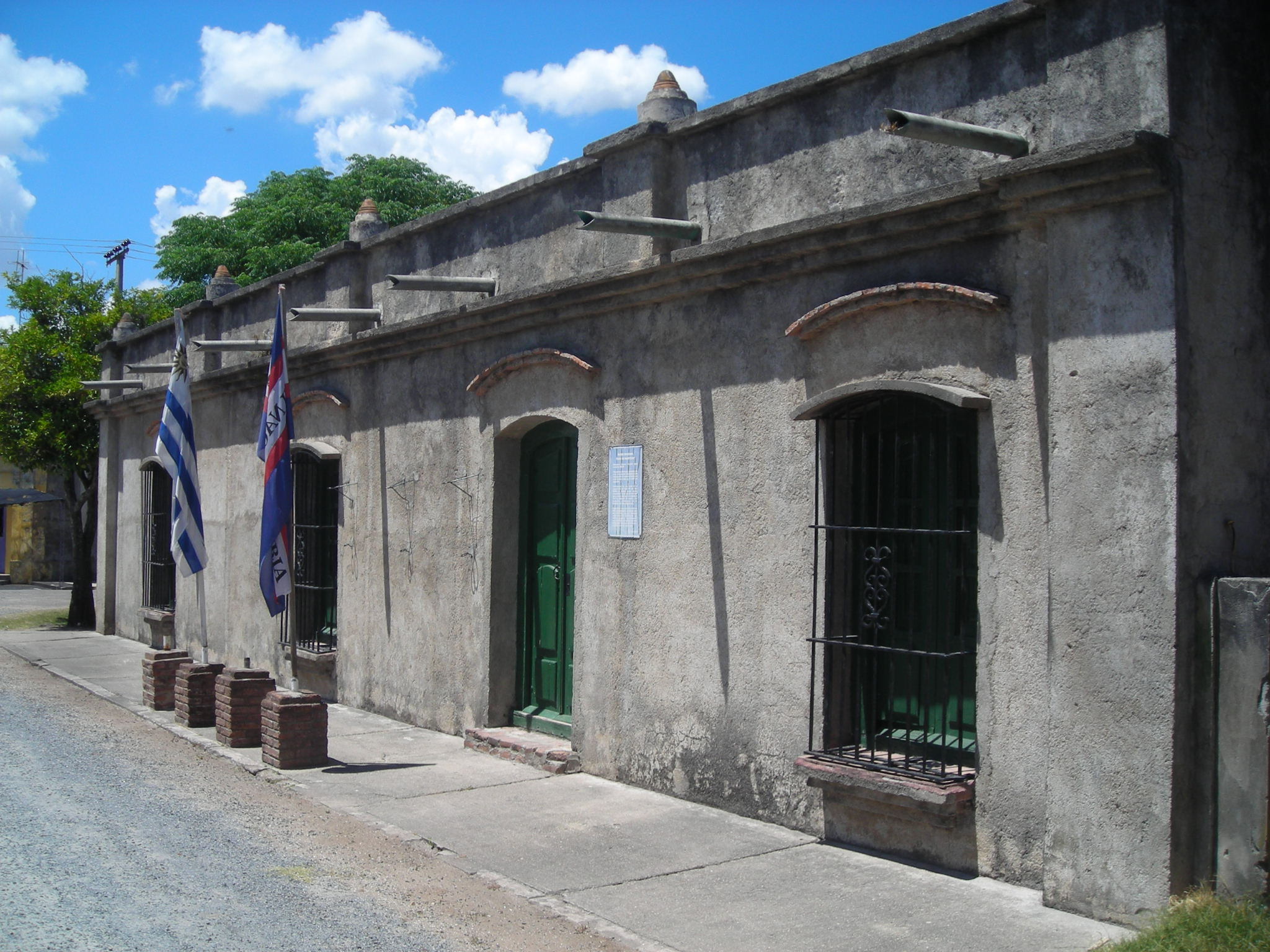 Casa de los Marfetán, actual Museo, biblioteca y guardería de la Junta Local de Villa Soriano. Ubicada en el departamento de Soriano